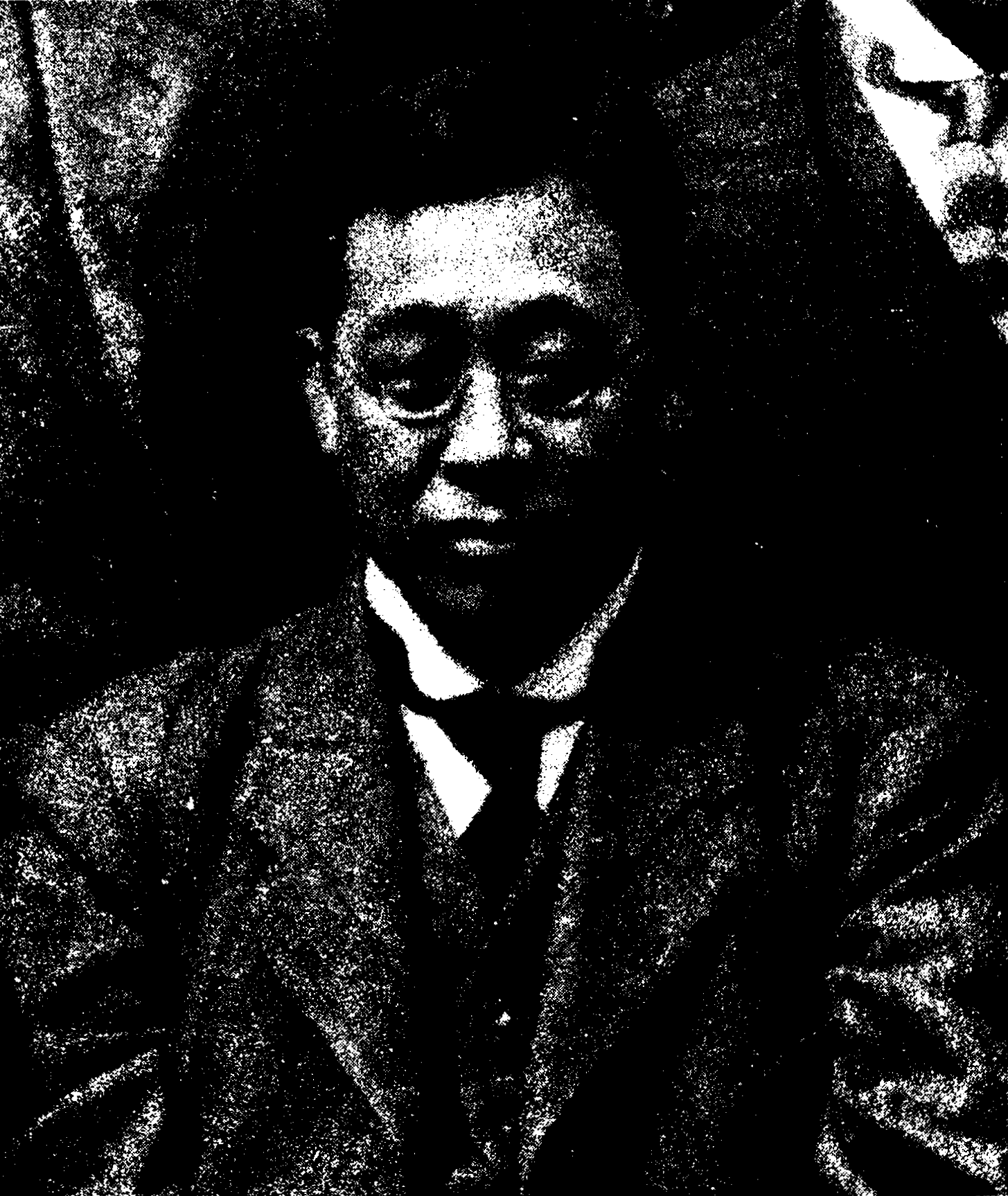 朝日新聞社勤務のときの土屋元作